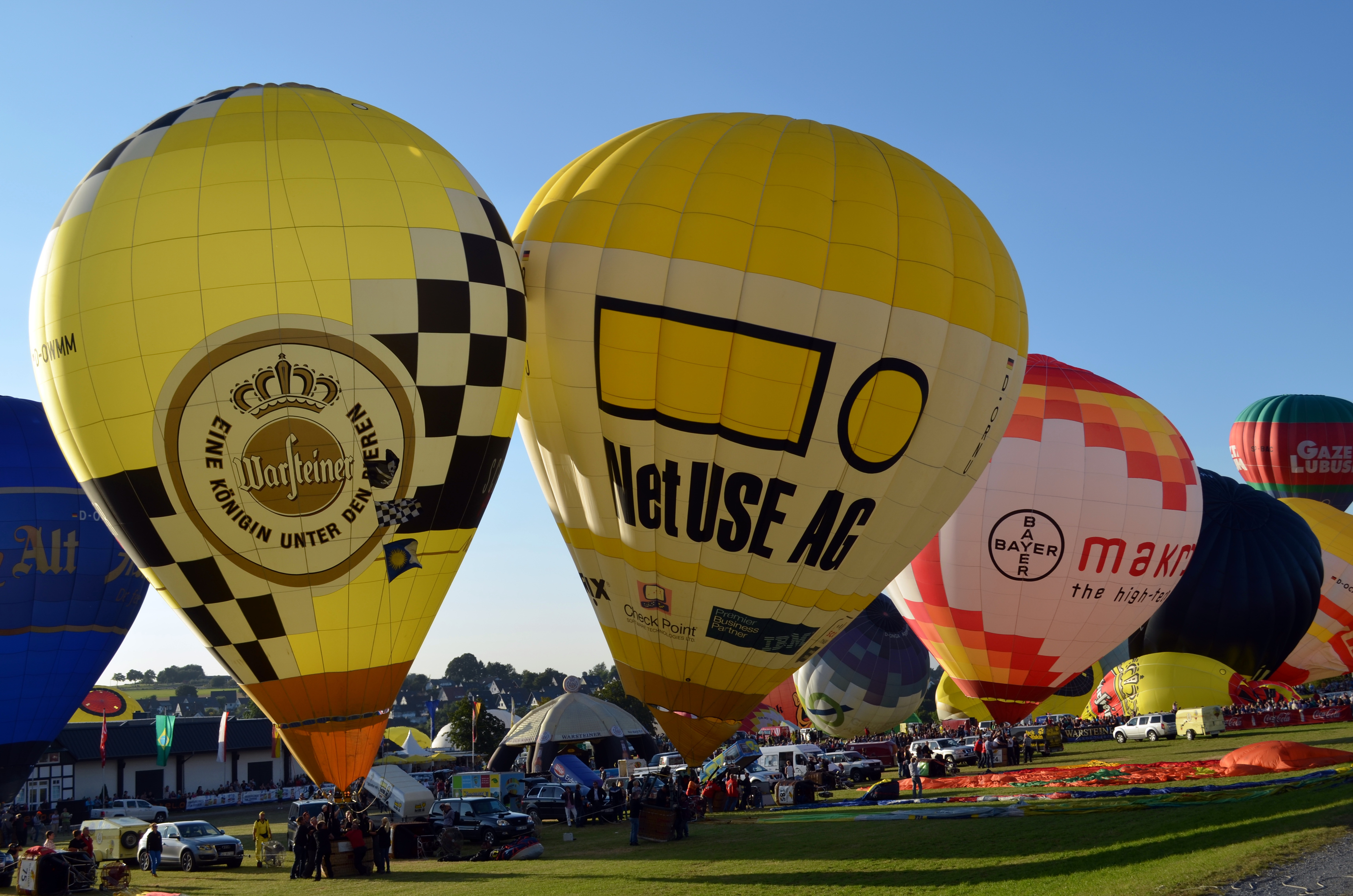 Warsteiner Internationale Montgolfiade 2012